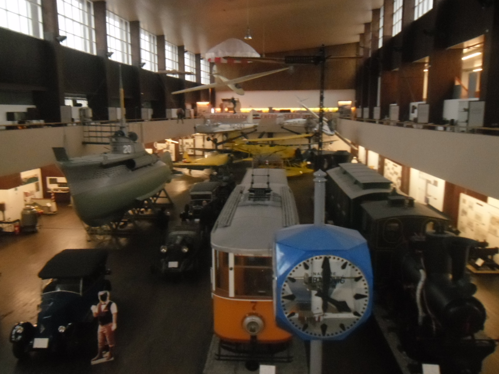 Tehnički muzej u Zagrebu